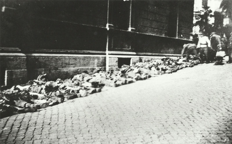 I resti dei militari del Polizeiregiment "Bozen" caduti nell'attentato di via Rasella allineati sul ciglio della strada